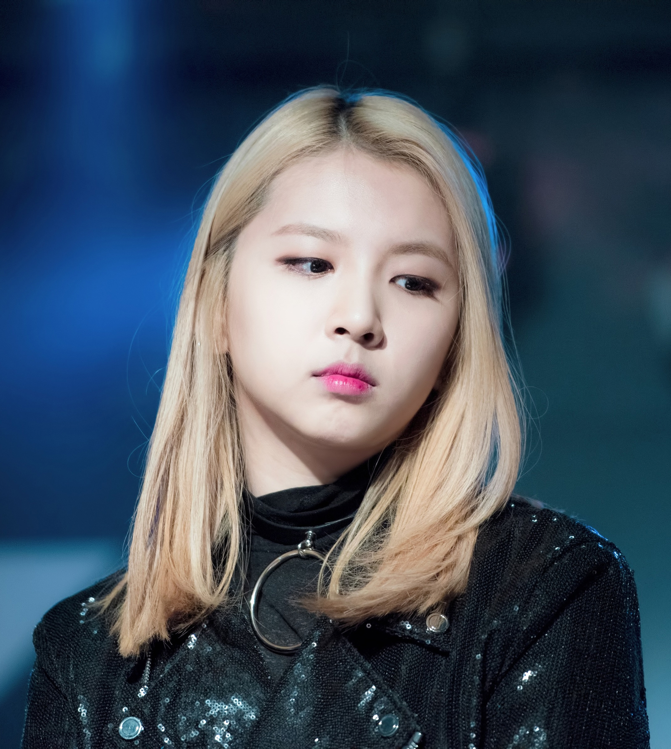 161212 신촌 KARD 데뷔파티 전지우 5Pic